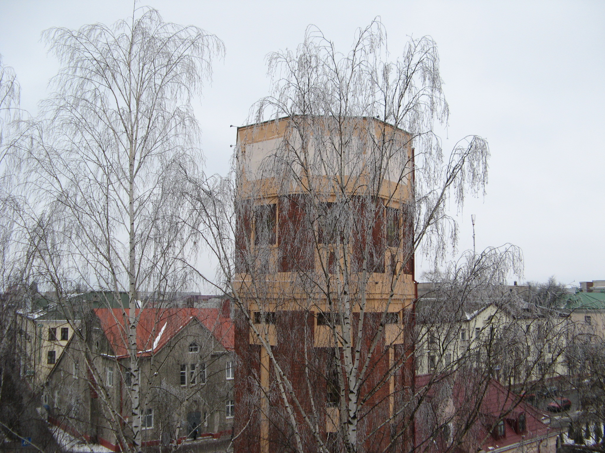 Panorama of Babrujsk